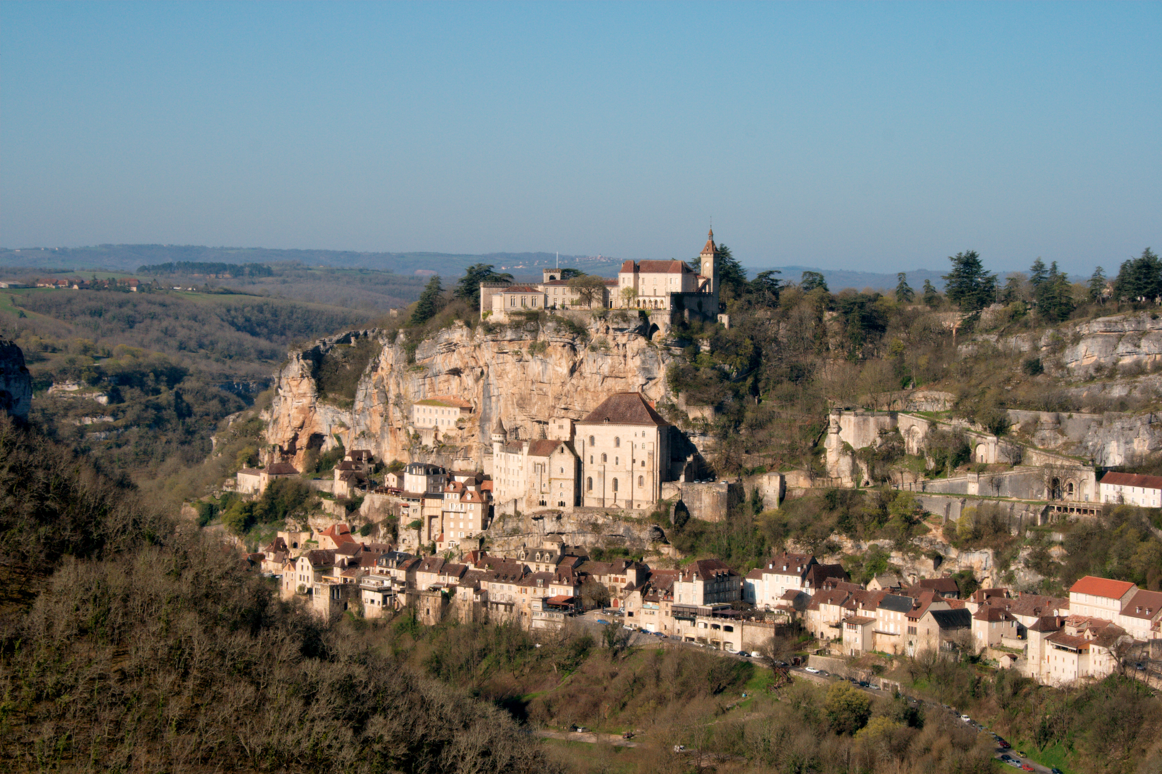 Rocamadour (France) vue générale de la ville